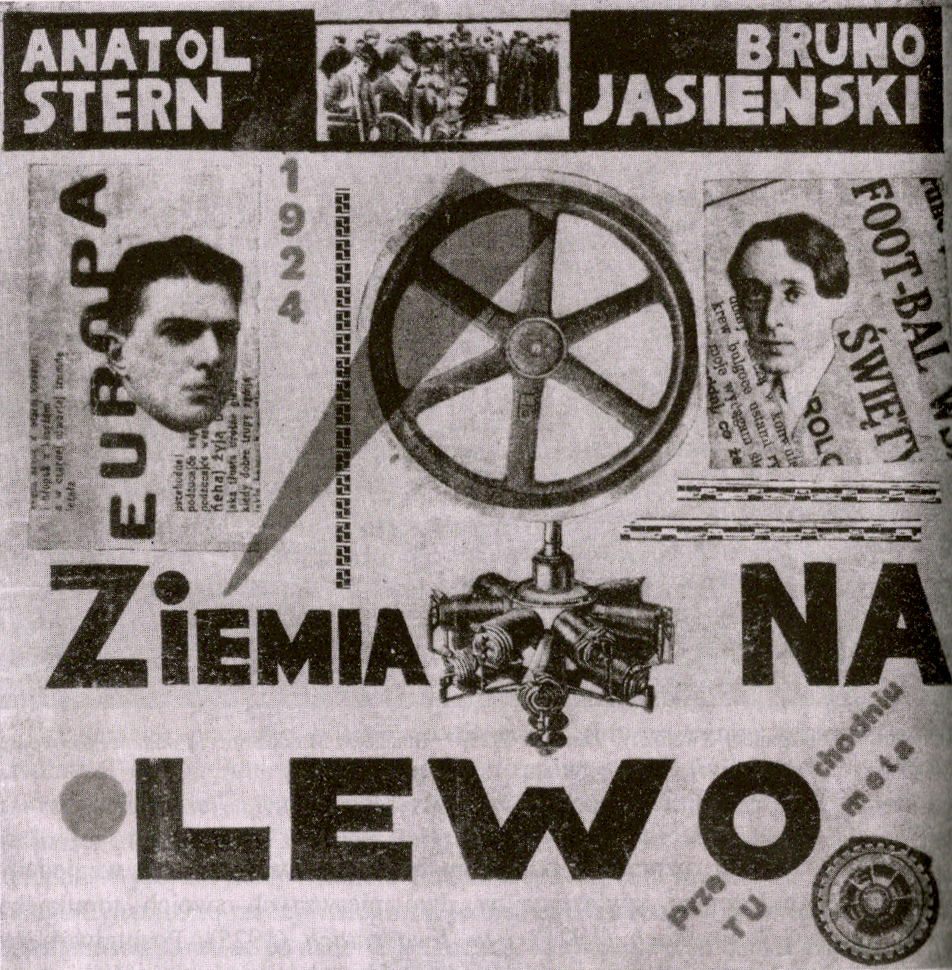 Okładka tomiku poetyckiego Anatola Sterna i Bruno Jasieńskiego "Ziemia na lewo" (wyd. 1924). Autorem okładki jest artysta plastyk Mieczysław Szczuka (zmarł w 1927 r.)